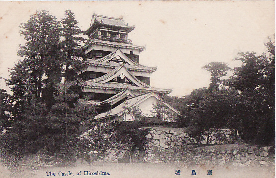 広島城天守閣（明治時代に撮影）